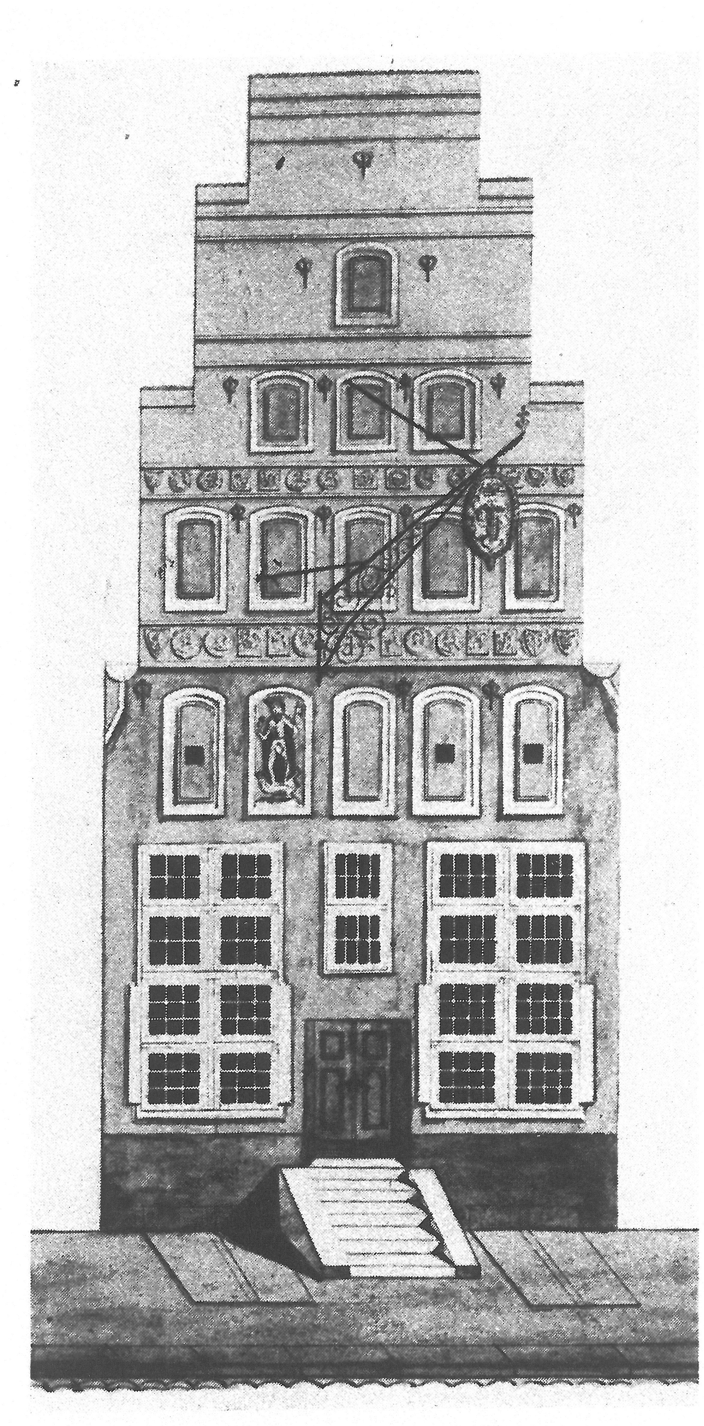 Bergenfahrer-Schütting in Lübeck, Breite Straße 67, genannt der "Große Lobben". 1557-1805 Amtshaus der Bergenfahrer in Lübeck. Abbruch 1889. Federzeichnung im Archiv der Bergenfahrer in Lübeck (um 1805).